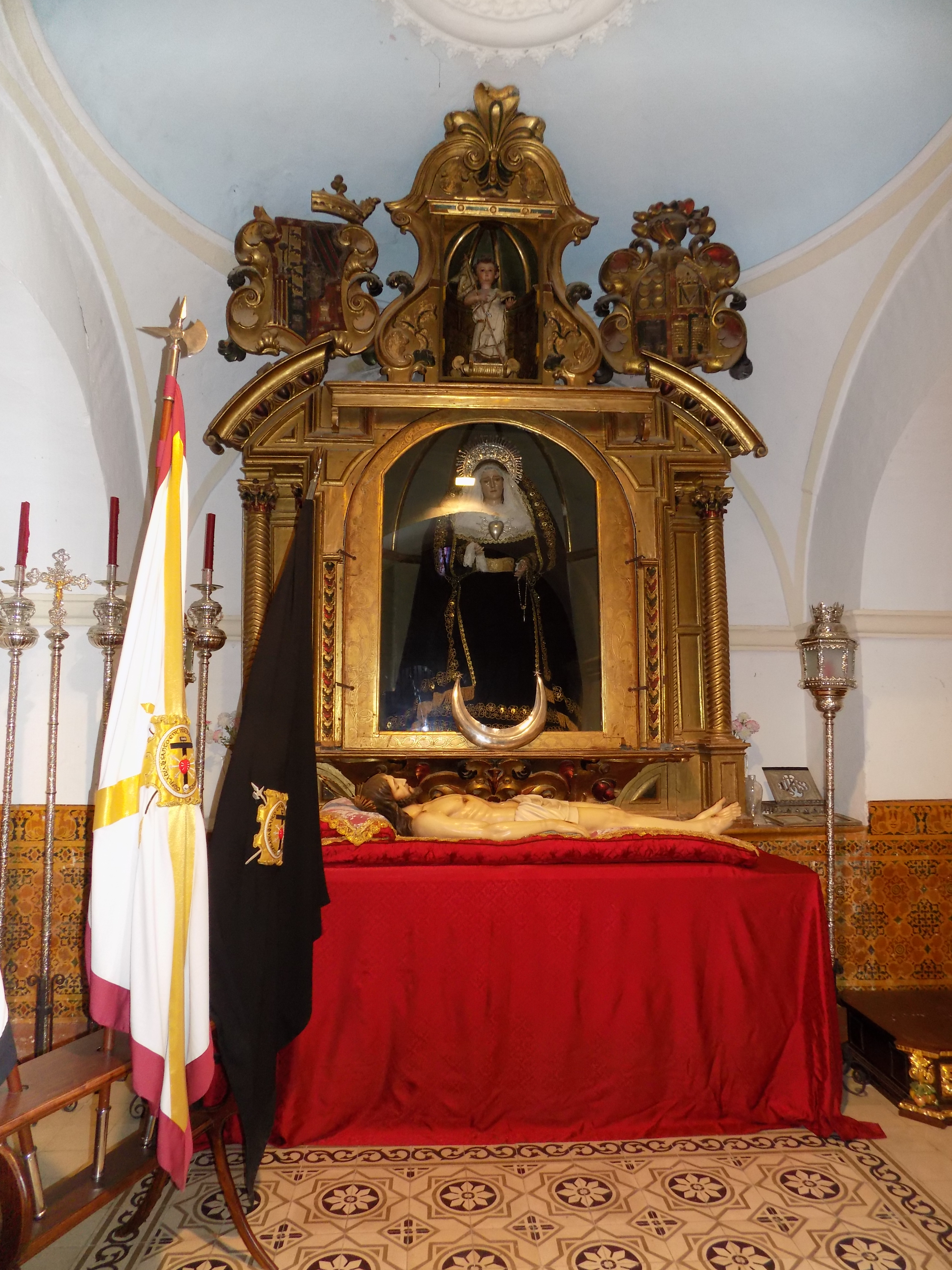 Capilla de Nuestra Señora de los Dolores de la iglesia de Nuestra Señora del Castillo de Fuente Obejuna, provincia de Córdoba, (España).